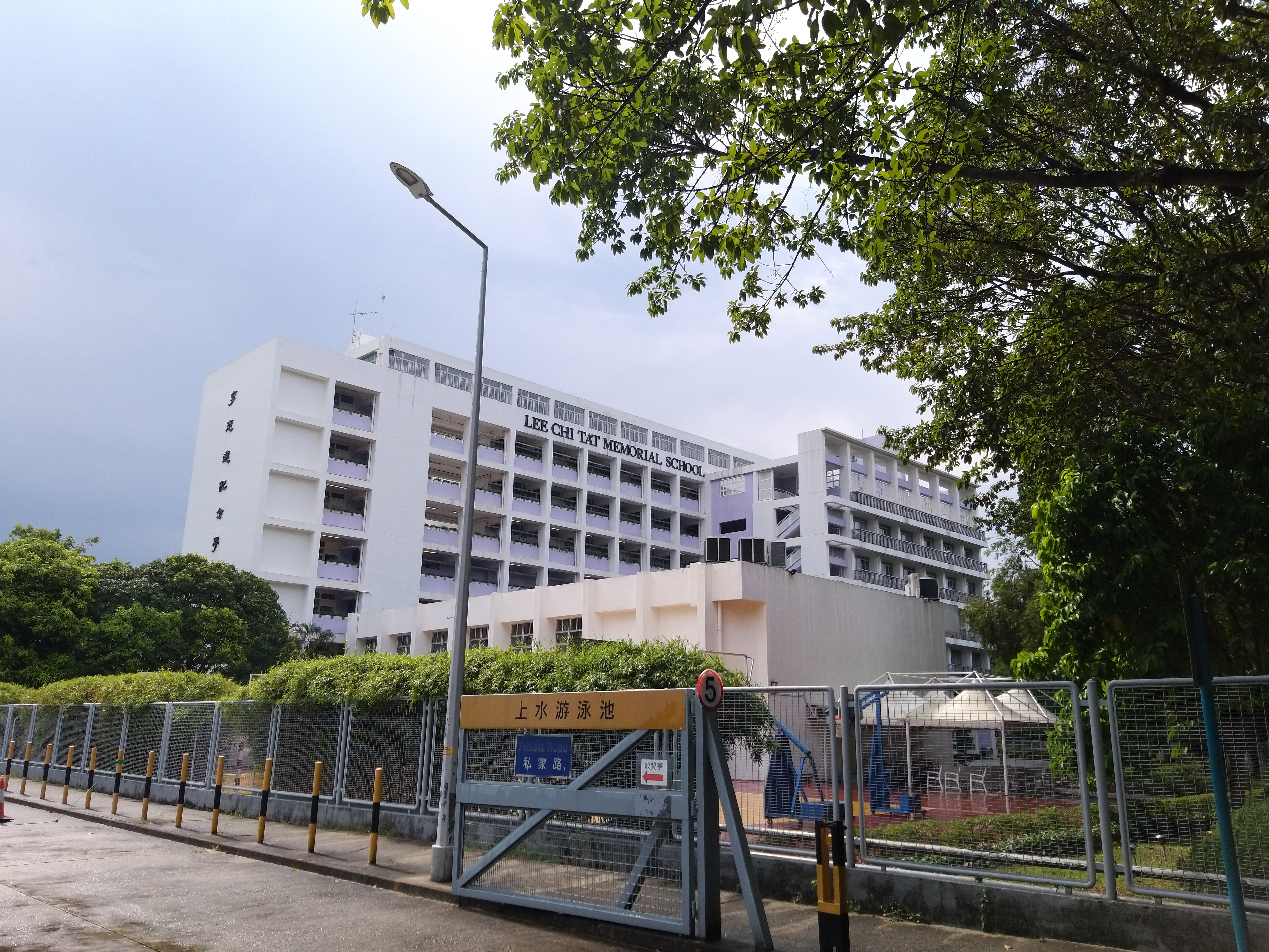 鄰近上水游泳池停車場入口